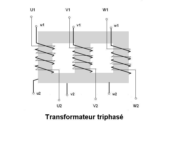 Schéma d'un transformateur triphasé